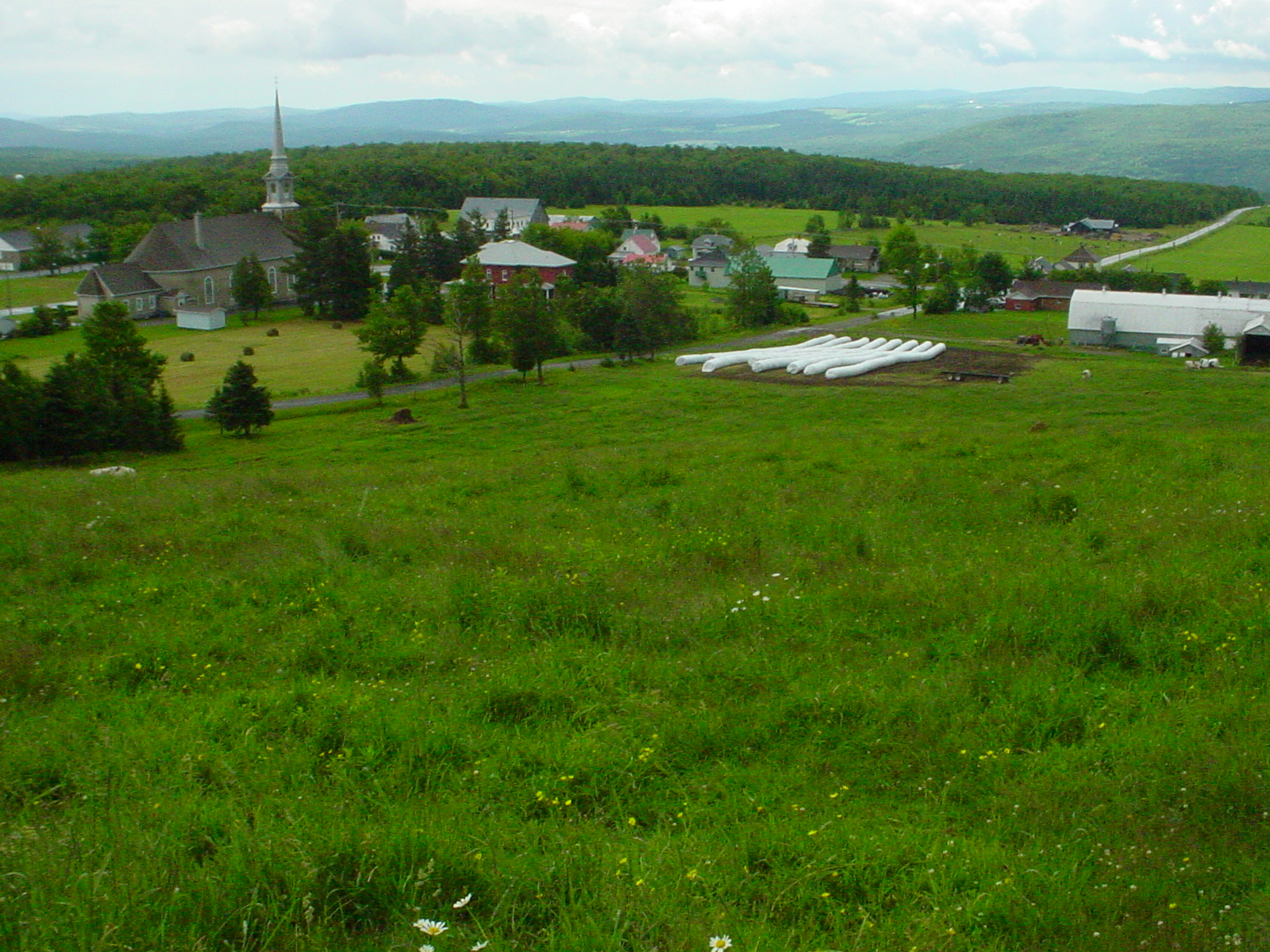 Photo du village de Saint-Adrien d'Irlande